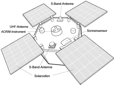 Ein übersetzter Plan des Forschungssatelliten ACRIMSat